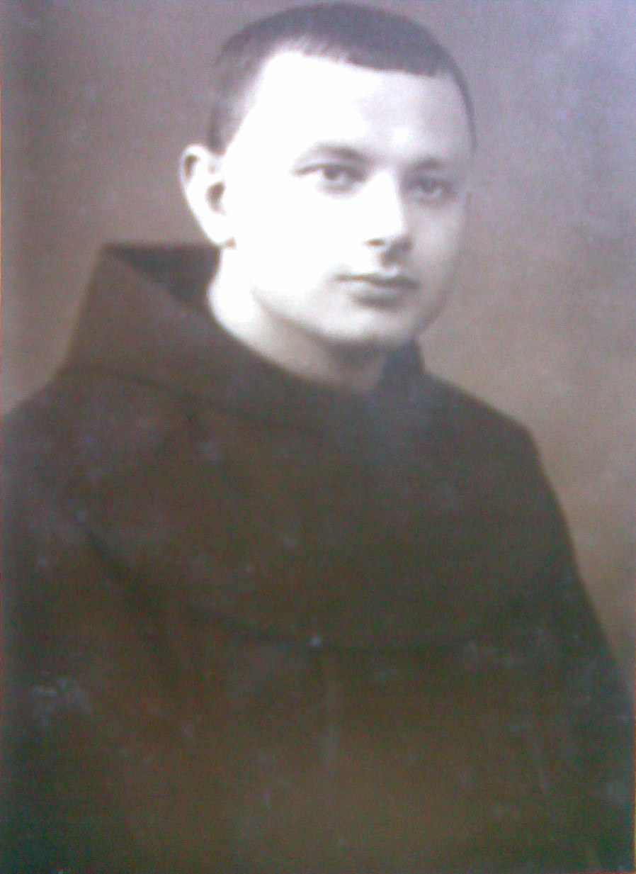 Wojciech Łuszczki w zakonie bernardynów